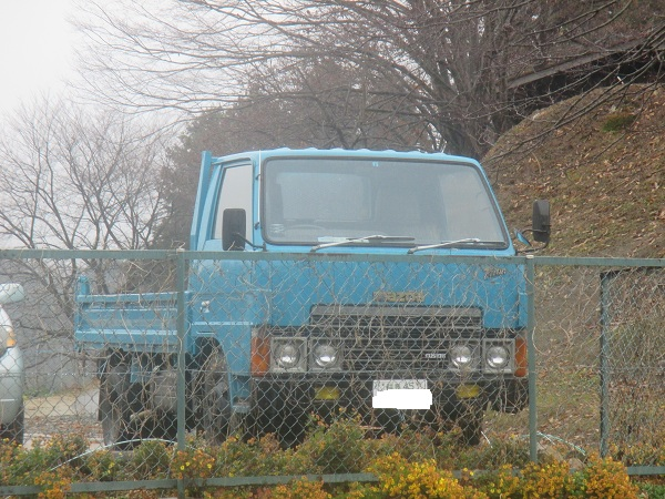 2014年12月撮影。 現役活躍中のダンプ仕様車。